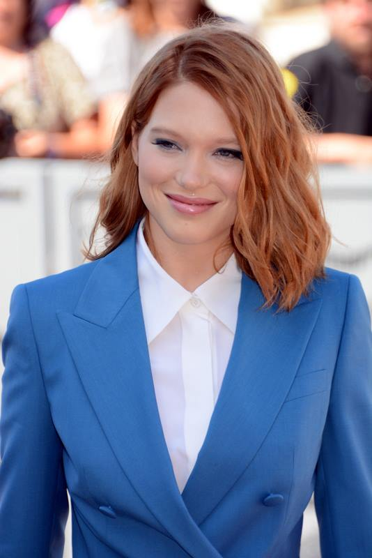 Léa Seydoux au festival de Cannes